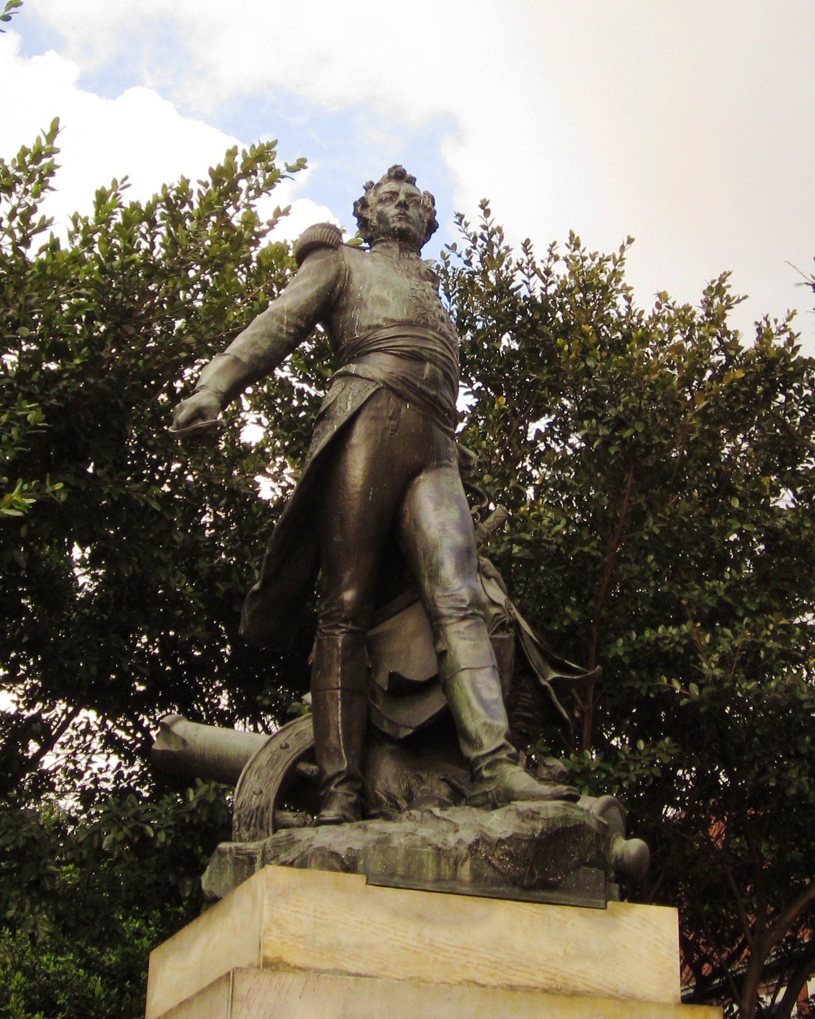 Escultura de Antonio Nariño, obra de Charles Raoul Verlet. Chapinero, zona norte de la plaza de Lourdes. Bogotá.